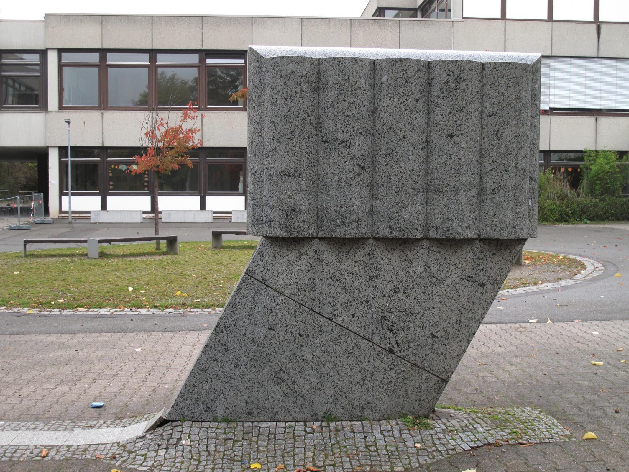 Elmar Daucher, o.T., 1976, Deutschland, Böblingen, Murkenbach-Schulhof